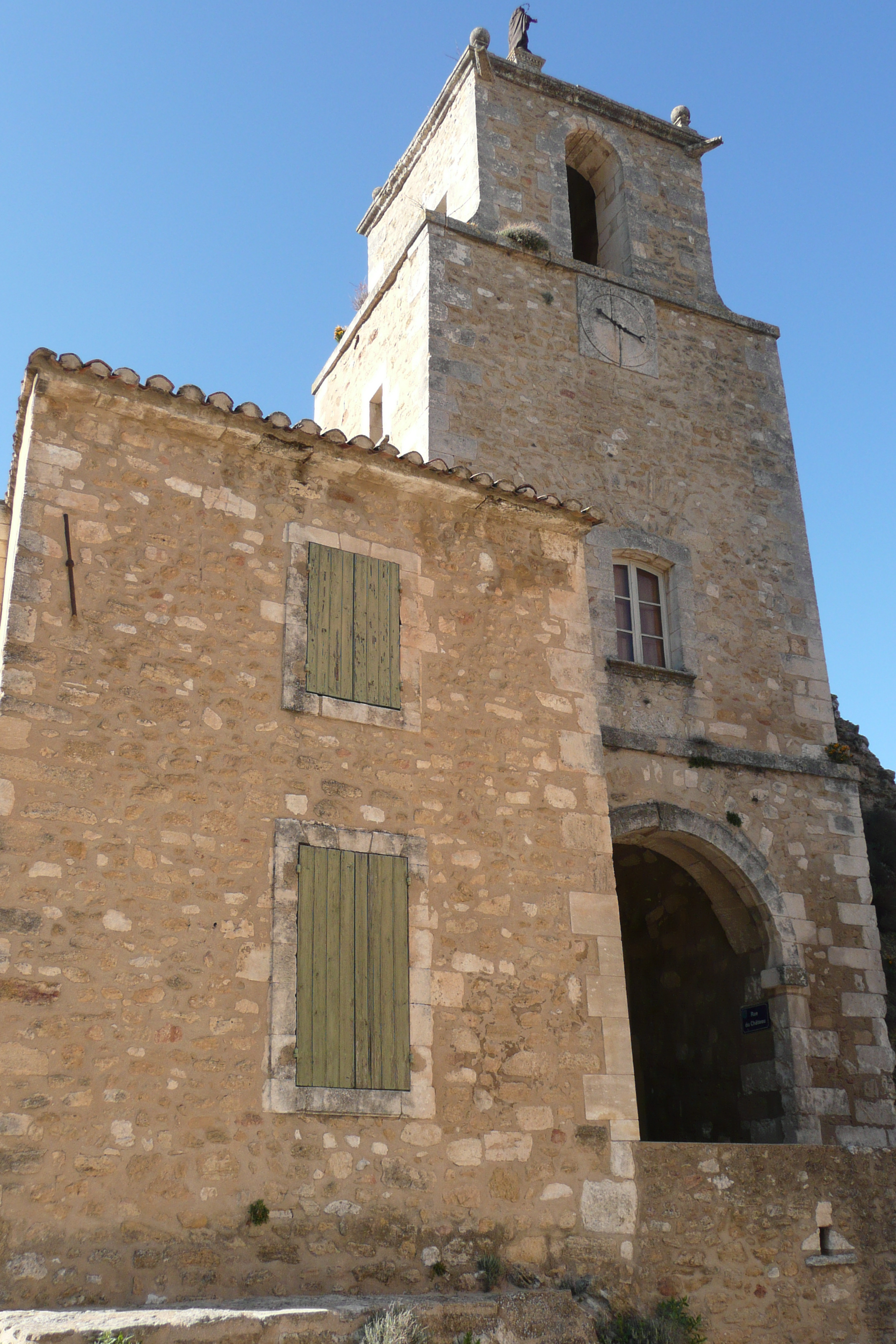 Château à Maubec.